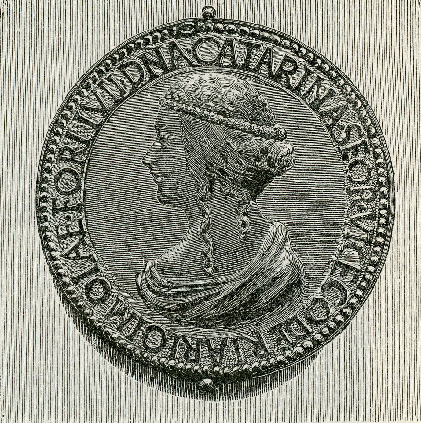 Imola: Medaglia di Caterina Riario-Sforza (xilografia).